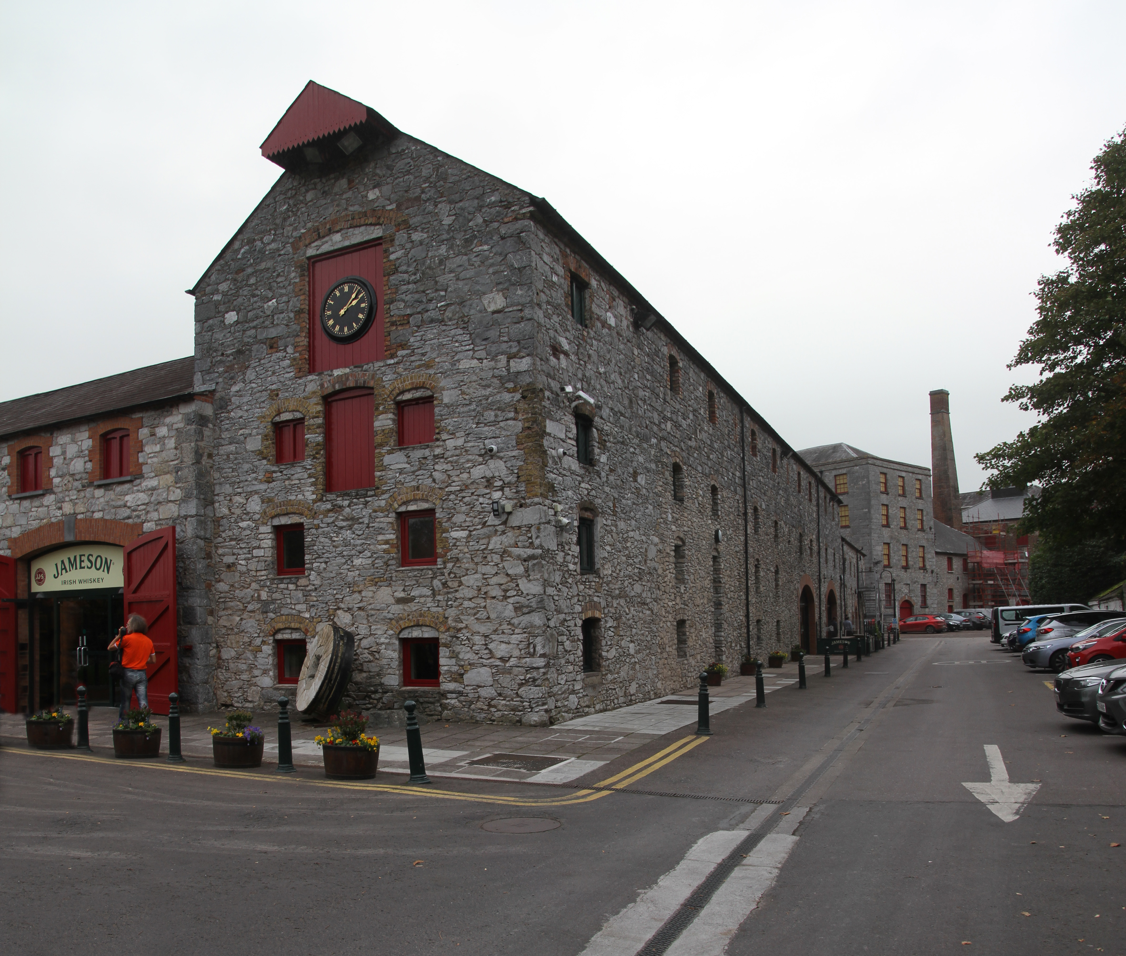 Jameson Whiskey Distillery in Midleton